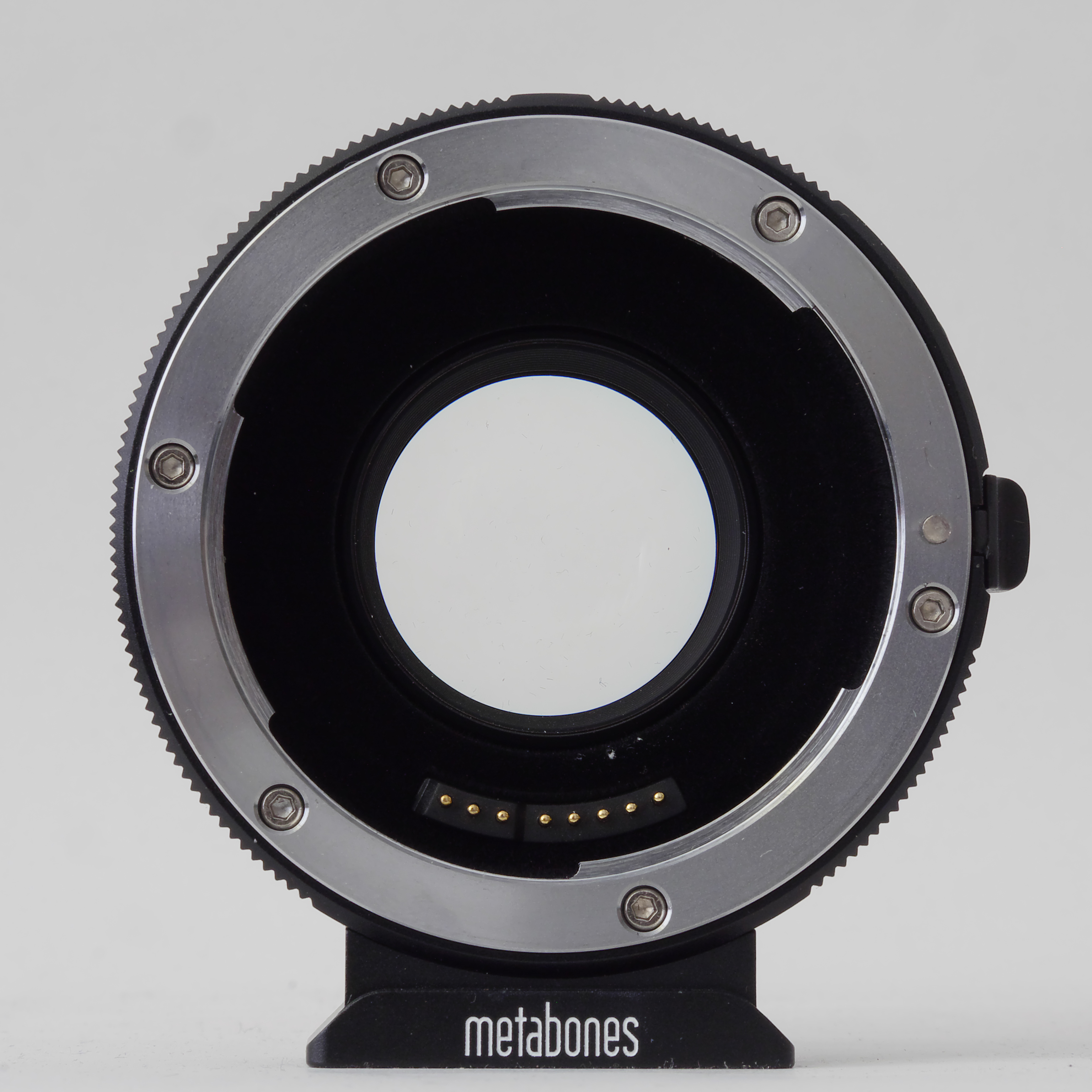 Telekompressor des Anbieters Metabones, Anschluss für ein Canon-EF-Objektiv.